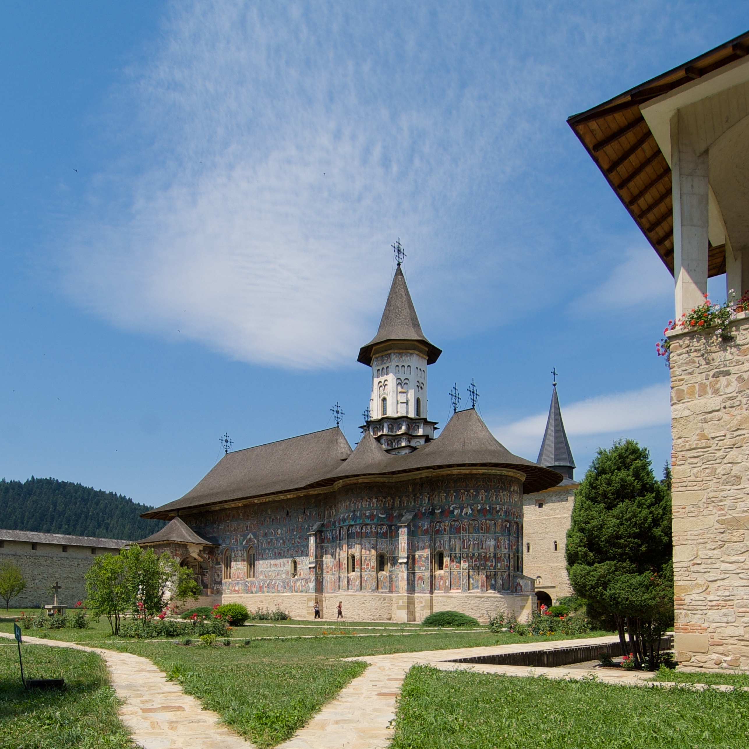 Sucevița